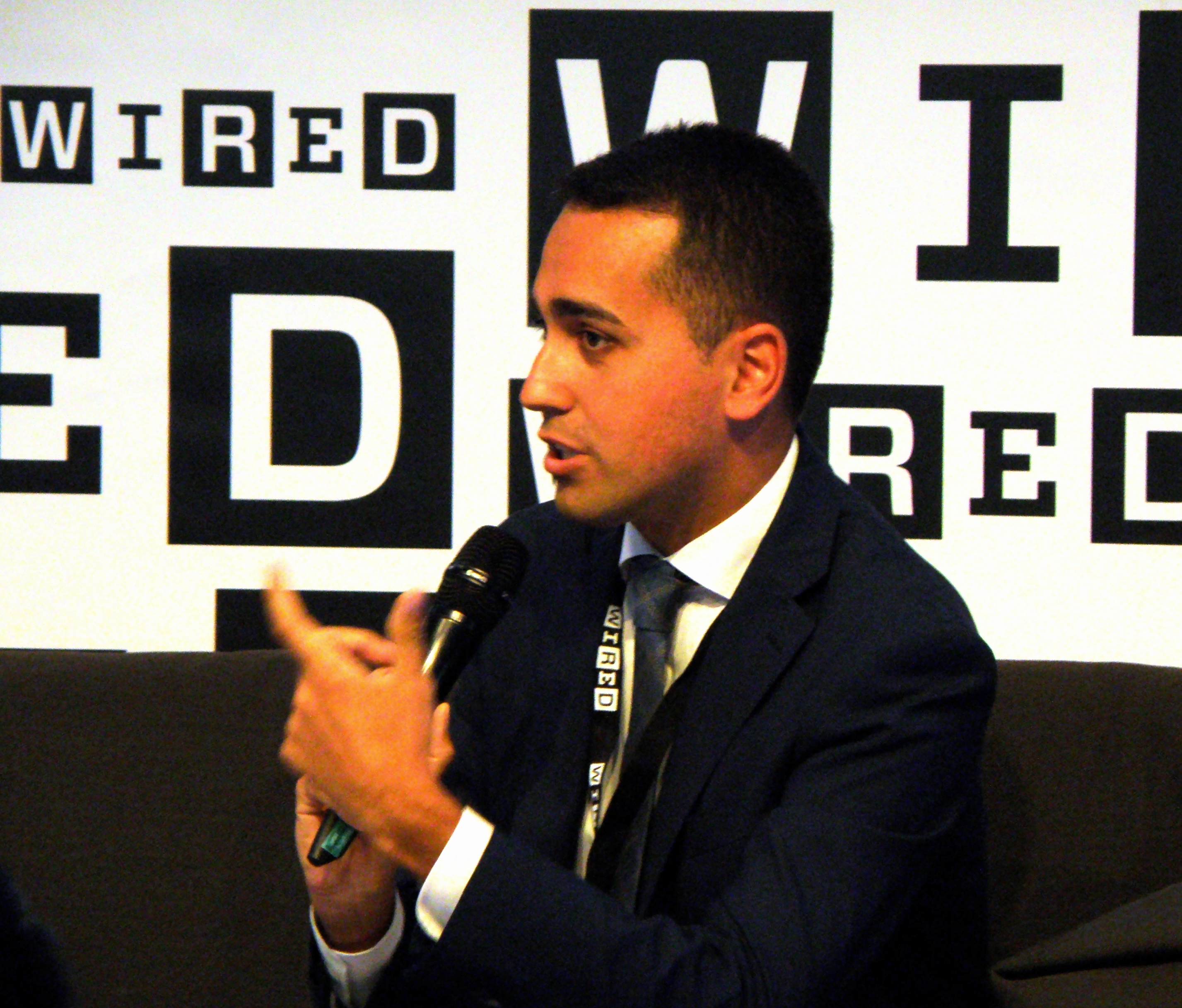 politico italiano, interviene al Wired Next Festival 2017, Milano